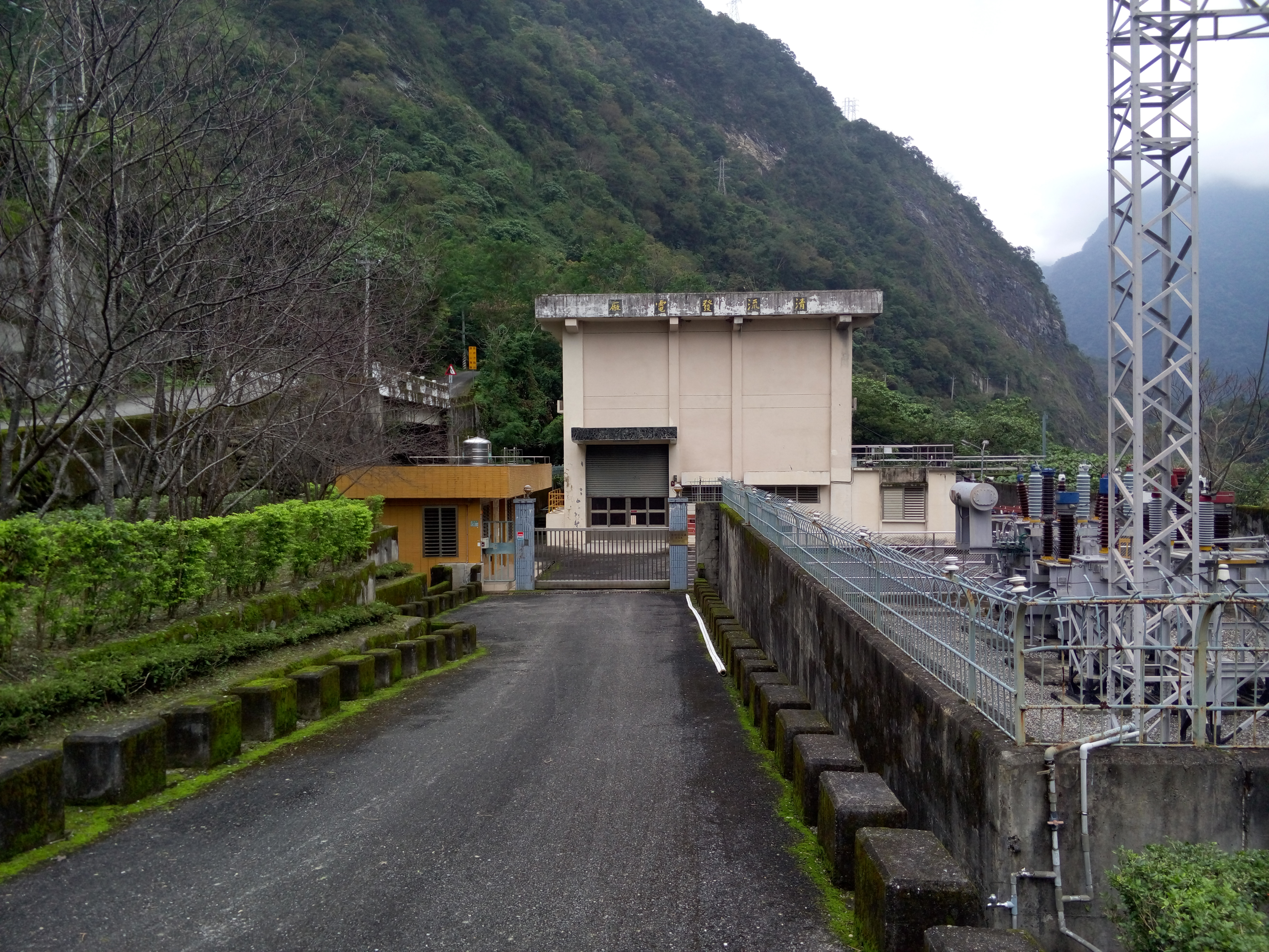 東部發電廠清流機組廠房與大門